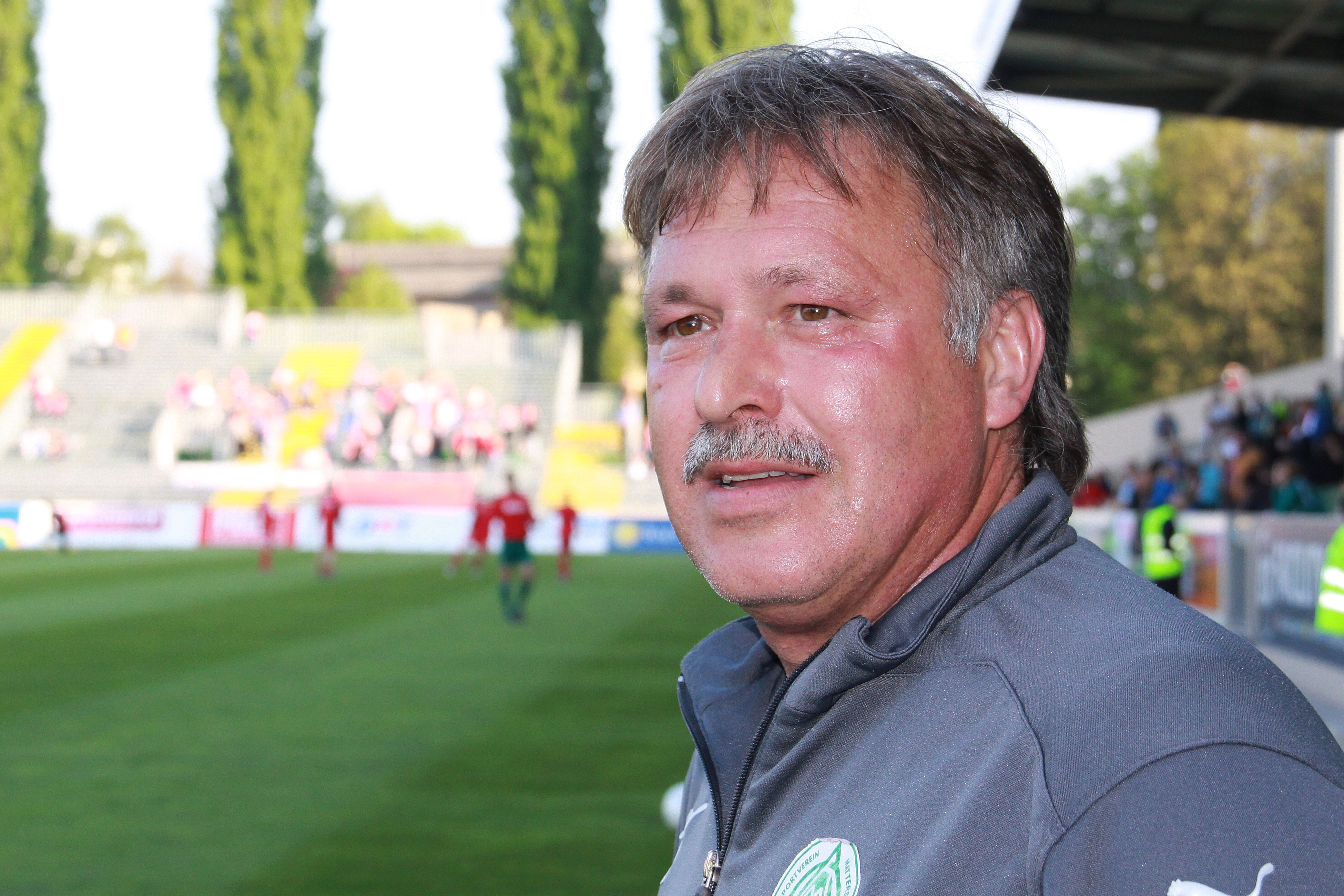 Leo Martinschitz – Tormann-Trainer, SV Mattersburg